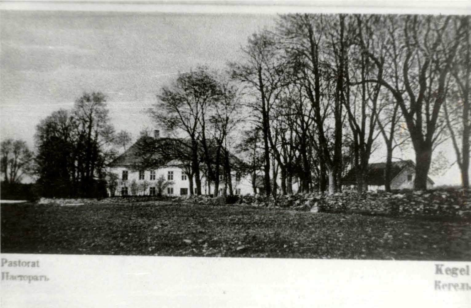 Vana foto Keilast.